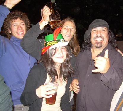 El Negro Piñera compartiendo con la juventud Valdiviana en la Bierfest Valdivia 2007.